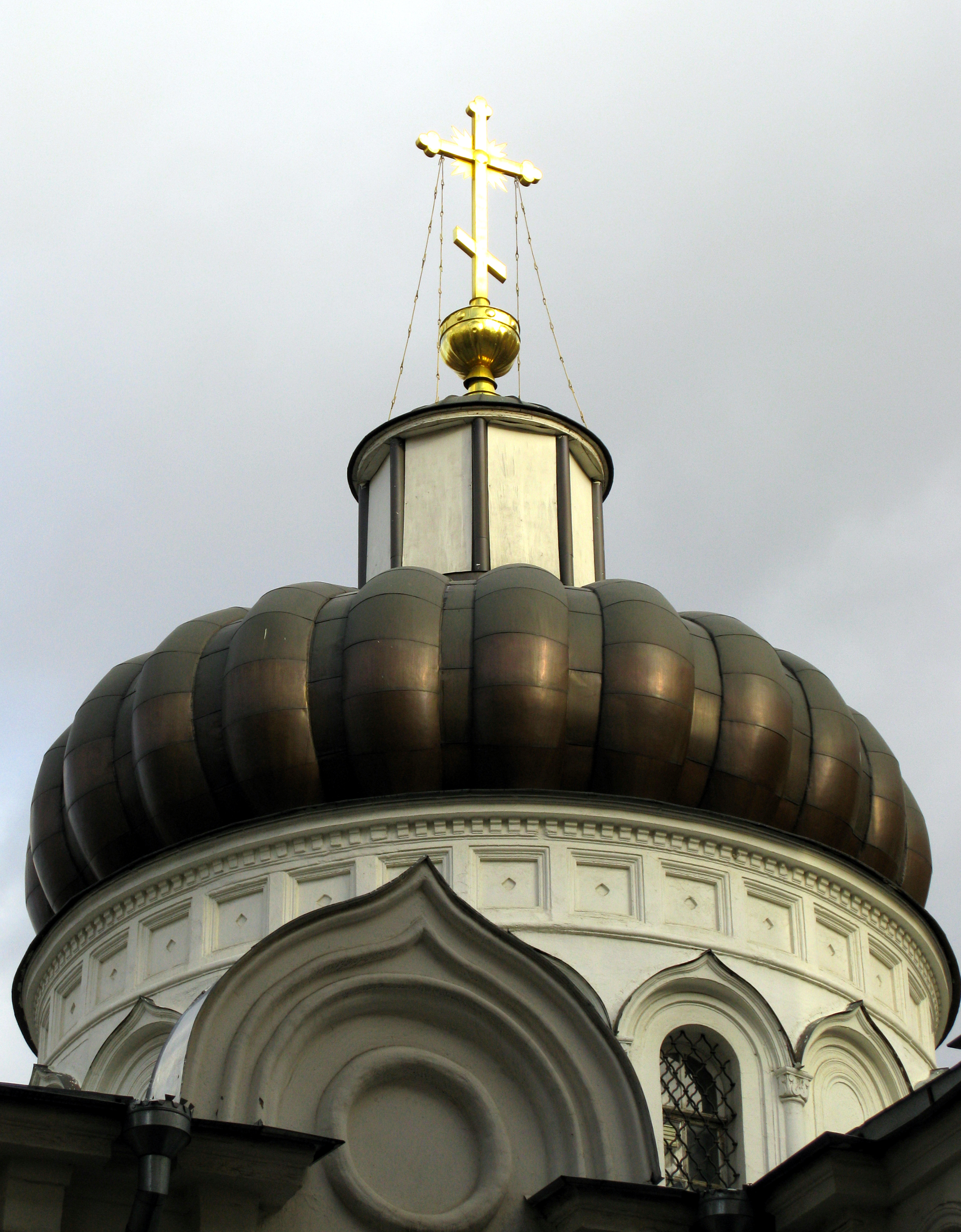 Храм Алексия человека Божия в Красном селе